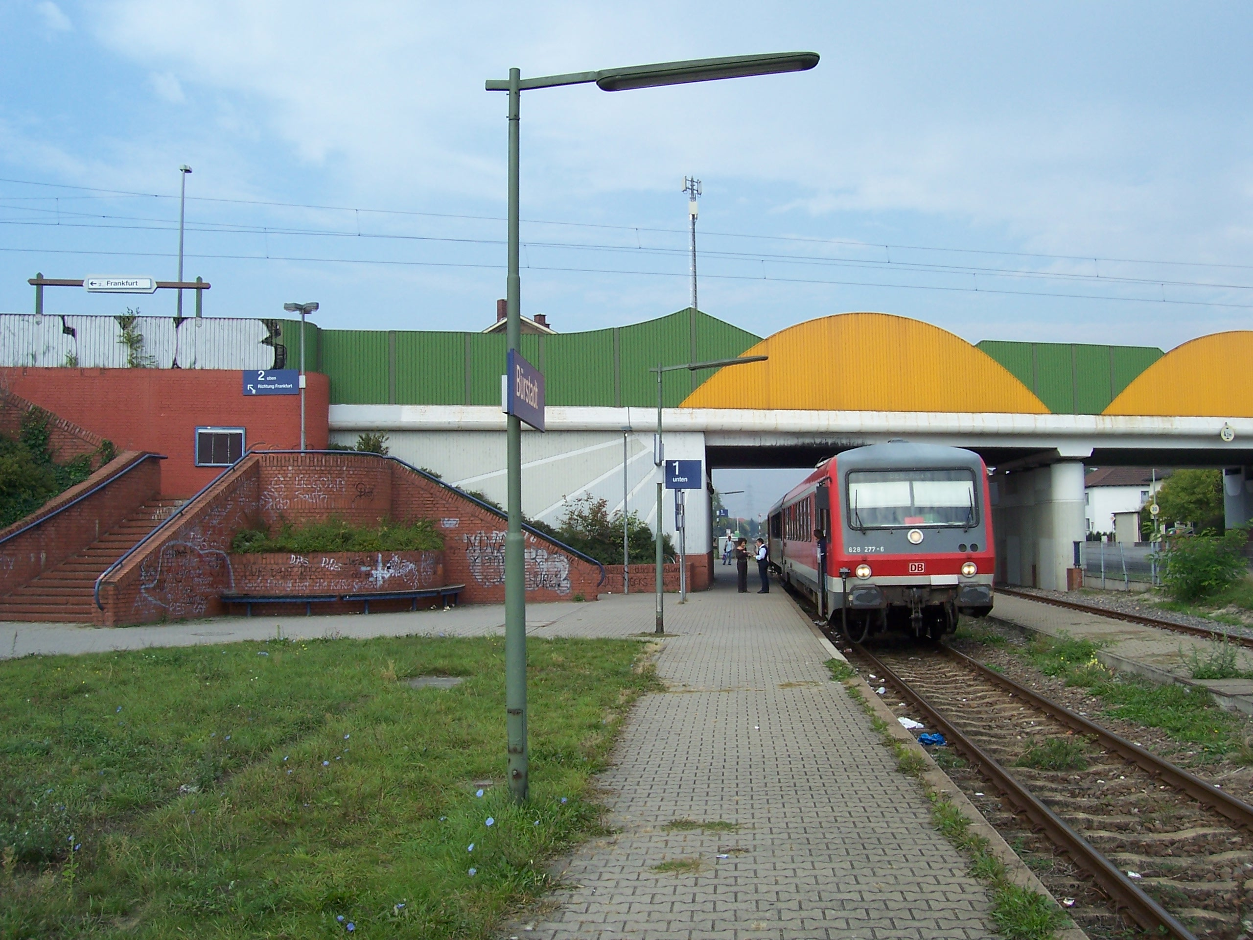 Turmbahnhof Bürstadt der Nibelungenbahn (unten) und der Riedbahn (oben auf der Brücke)